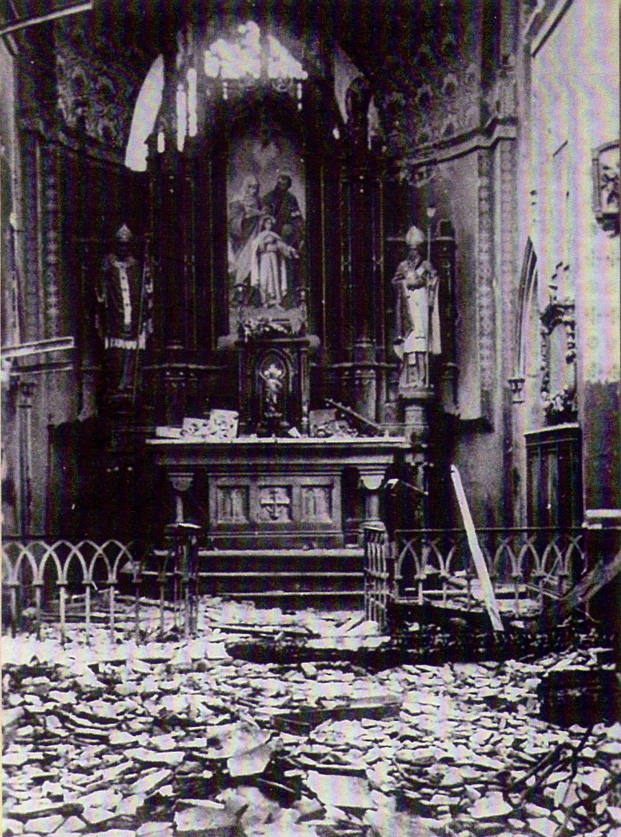 Prezbiterium kościoła po ostrzale artyleryjskim